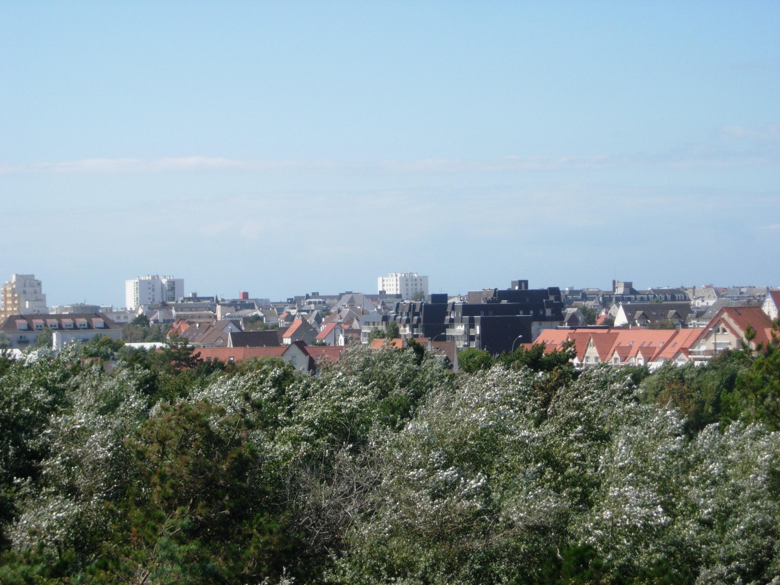 berck